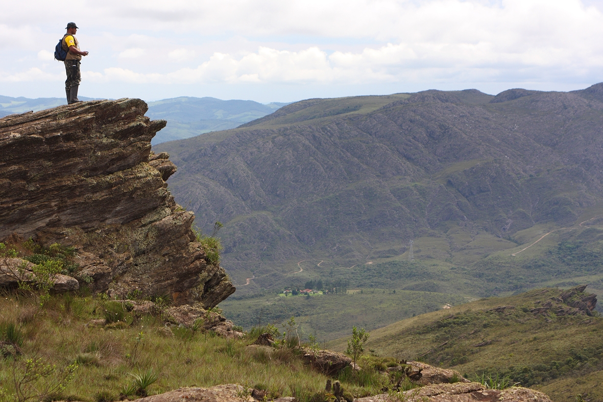 Trilha do Uaimií em São Bartolomeu, distrito de Ouro Preto